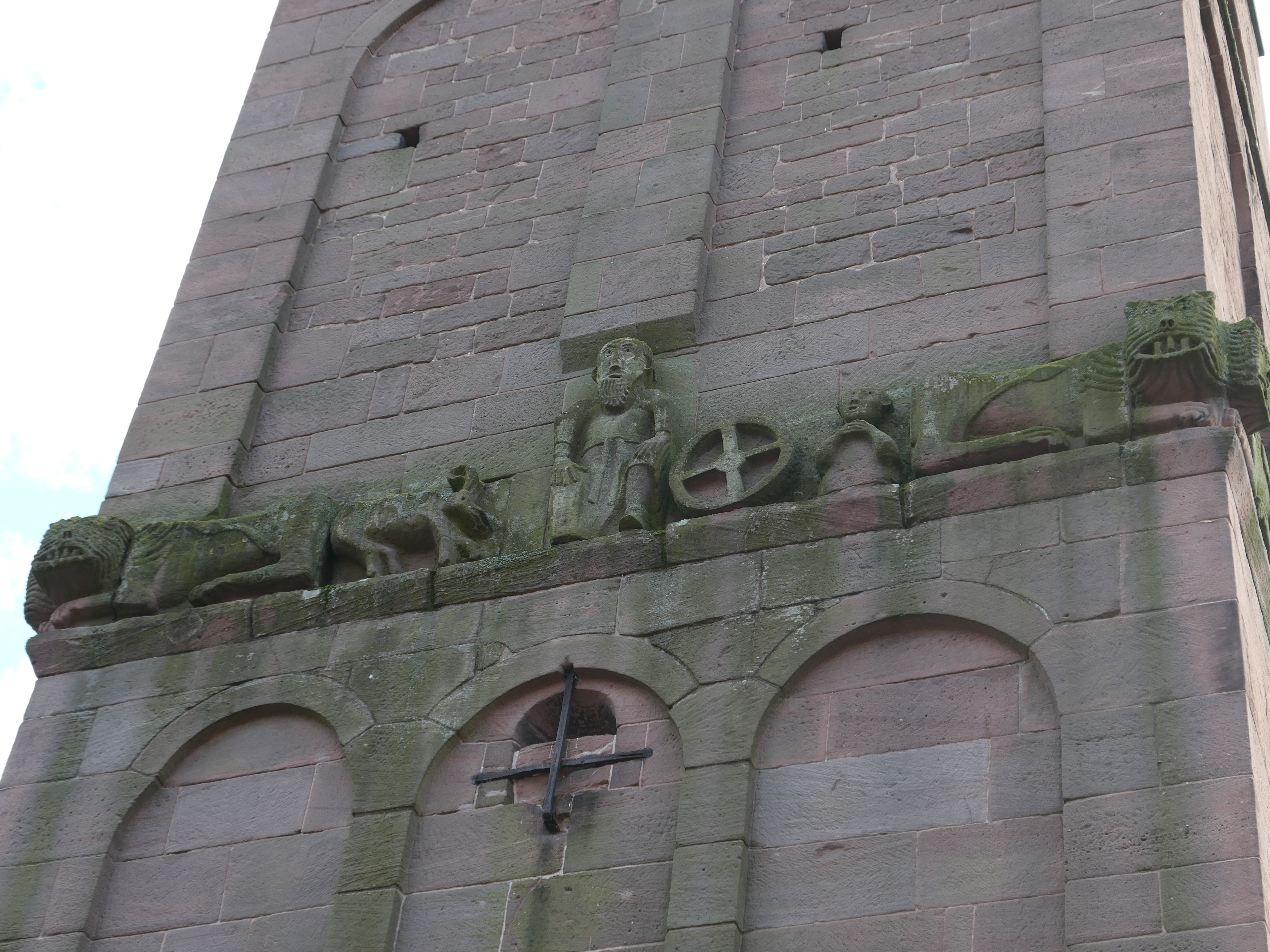 Ehem. Kloster St. Peter und Paul Hirsau Relief romanischer Eulenturm